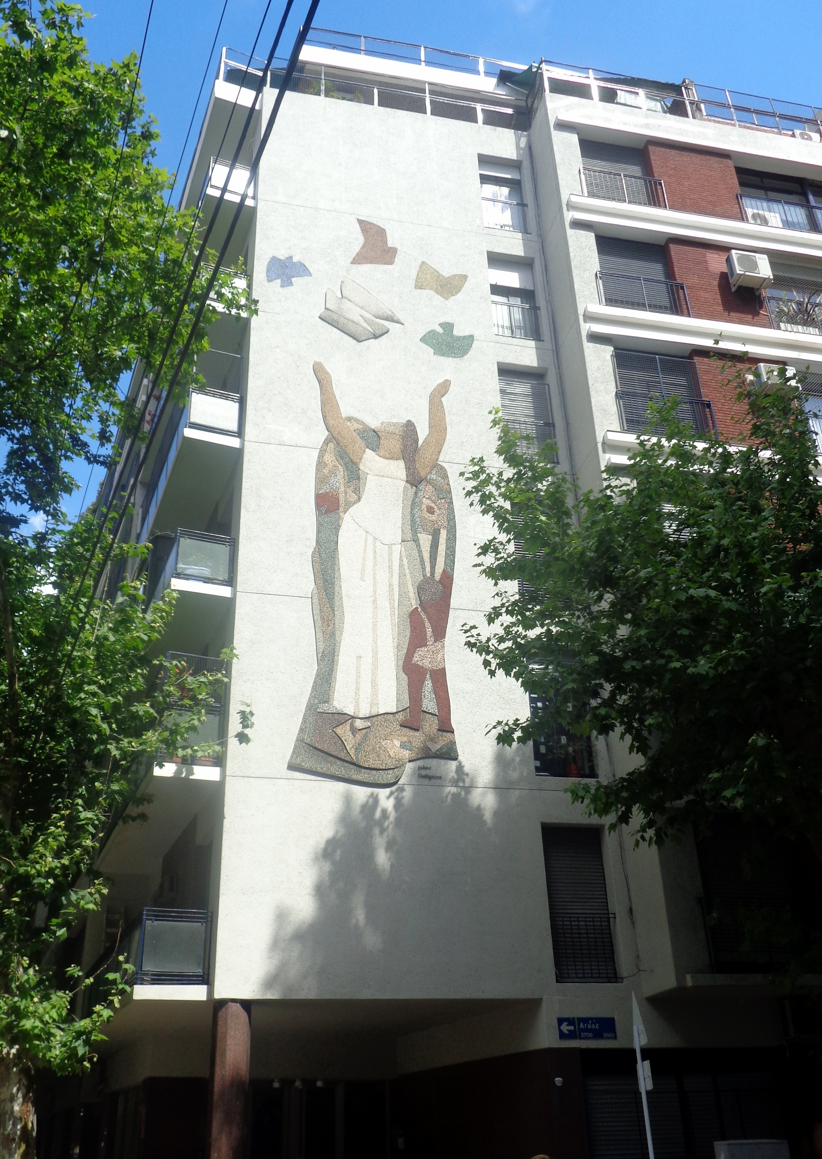 Araoz 2689 (esquina Beruti). Bajorrelieve del pintor Juan Carlos Castagnino. Palermo, Buenos Aires, Argentina.